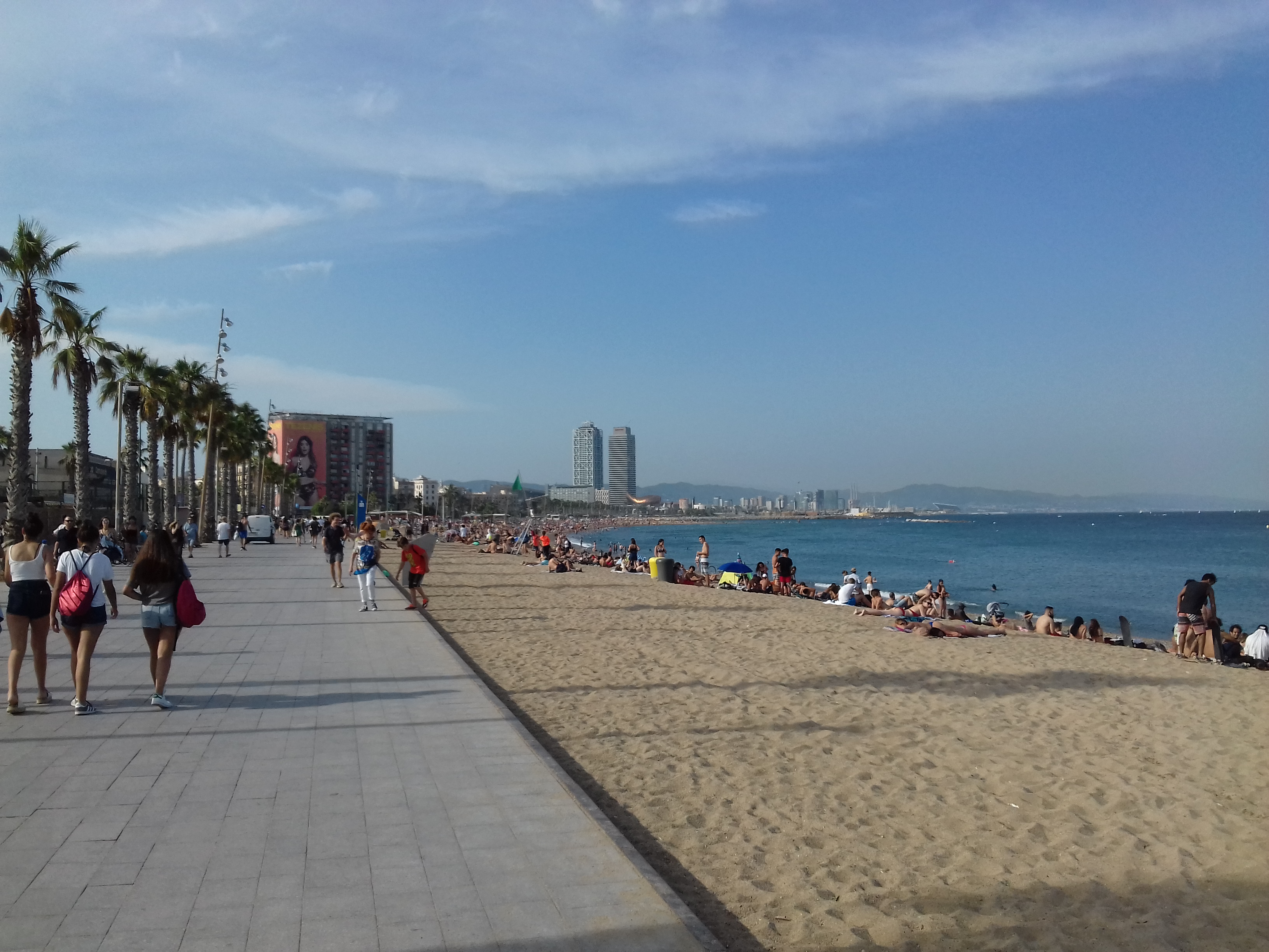 Пляж Барселонета